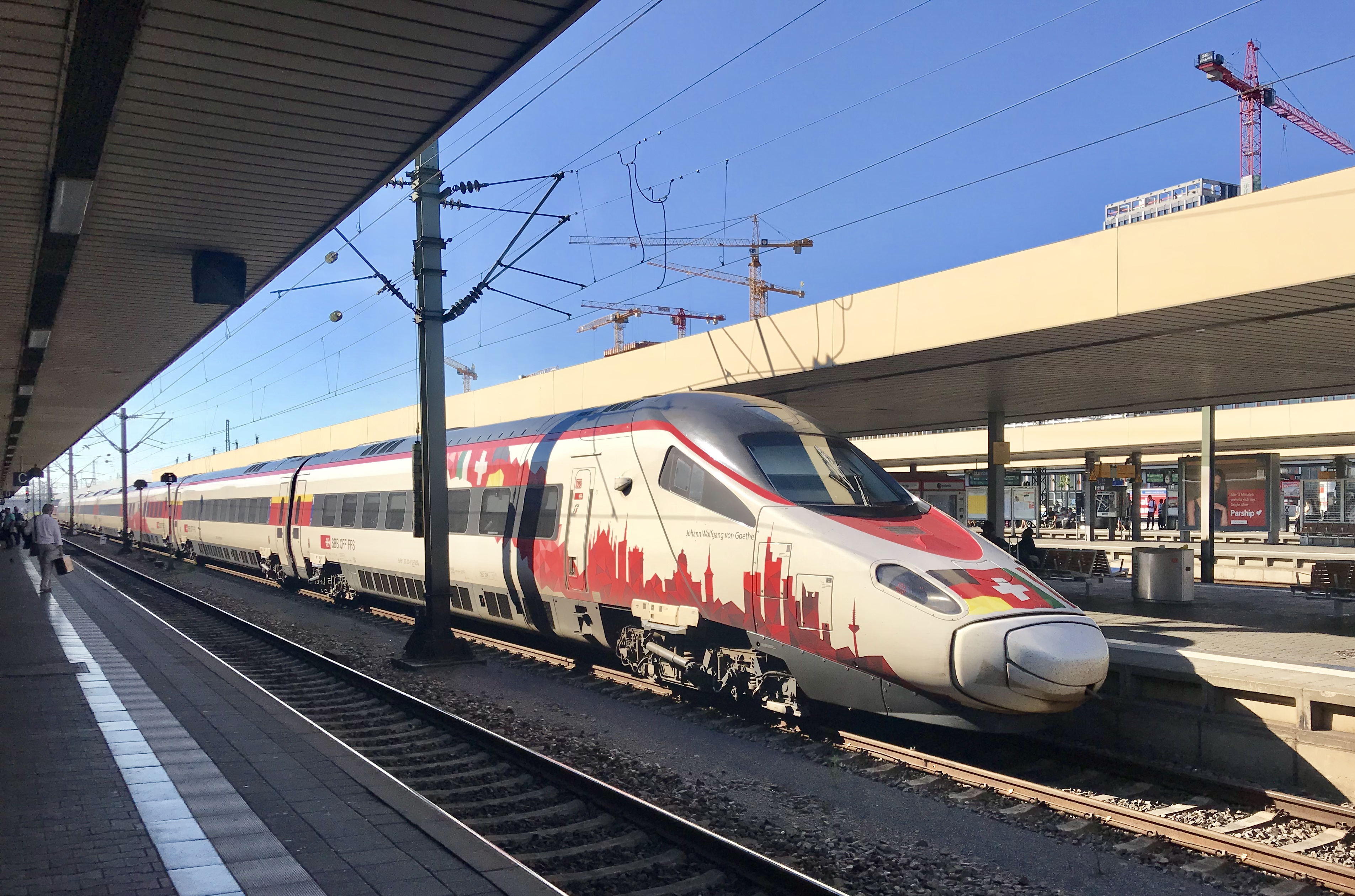 ETR 610 als ECE 451 in Mannheim Hbf, Deutschland, Juni 2019